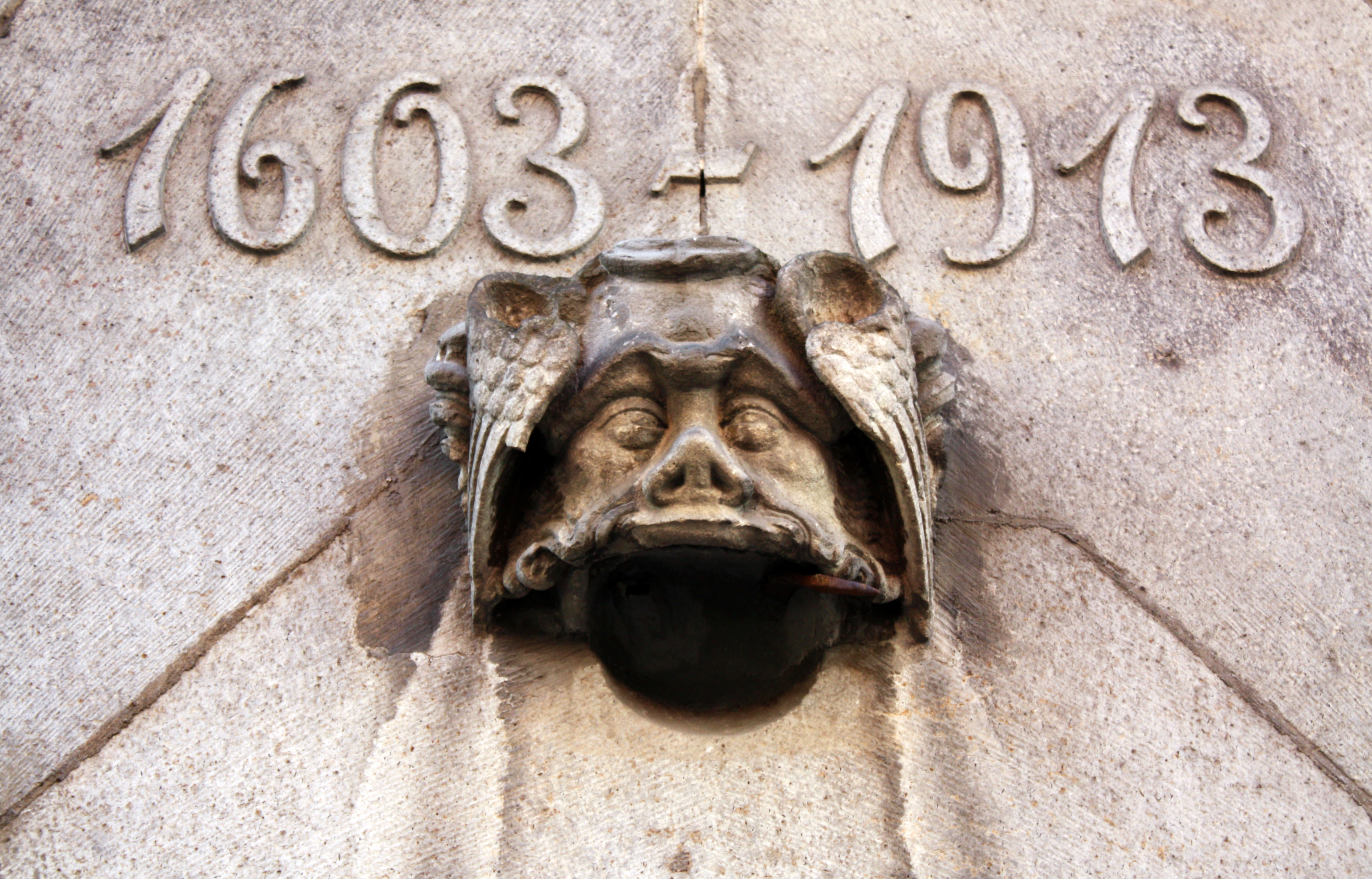 Köln Altstadt, Grinkopf am Haus Steinweg 3